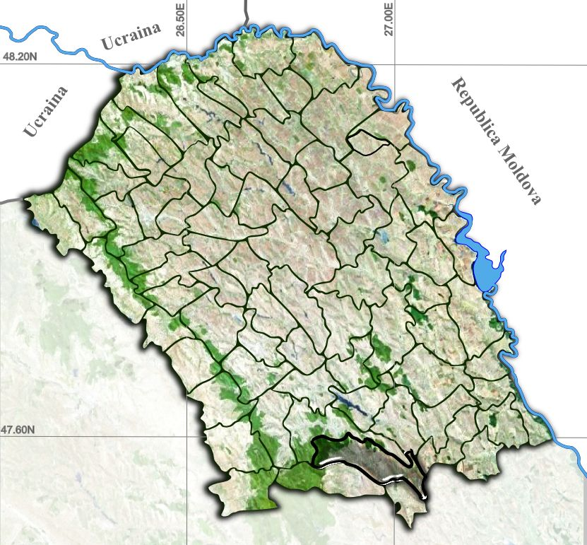 Flamanzi jud Botosani.